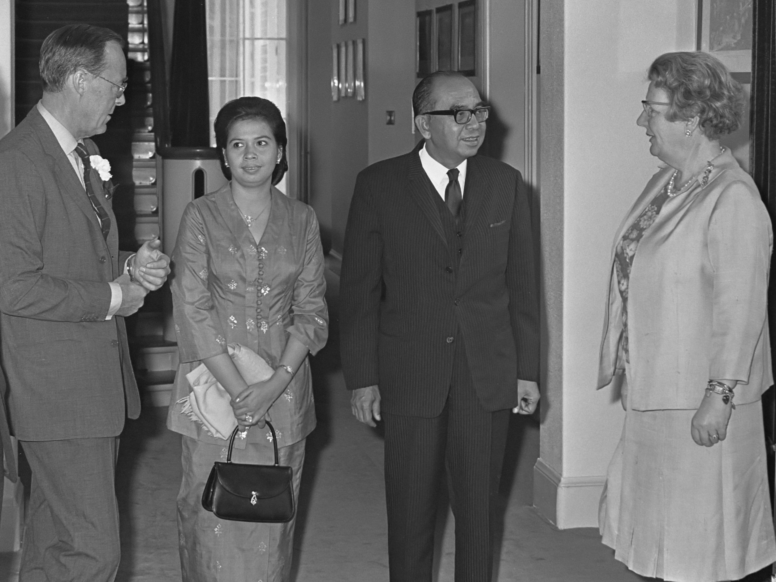 Vice premier Maleisie op Paleis Soestdijk ontvangen. Hare Majesteit , prins Bernhard met dhr. en mevrouw Tun Abdul Razak 15 mei 1968